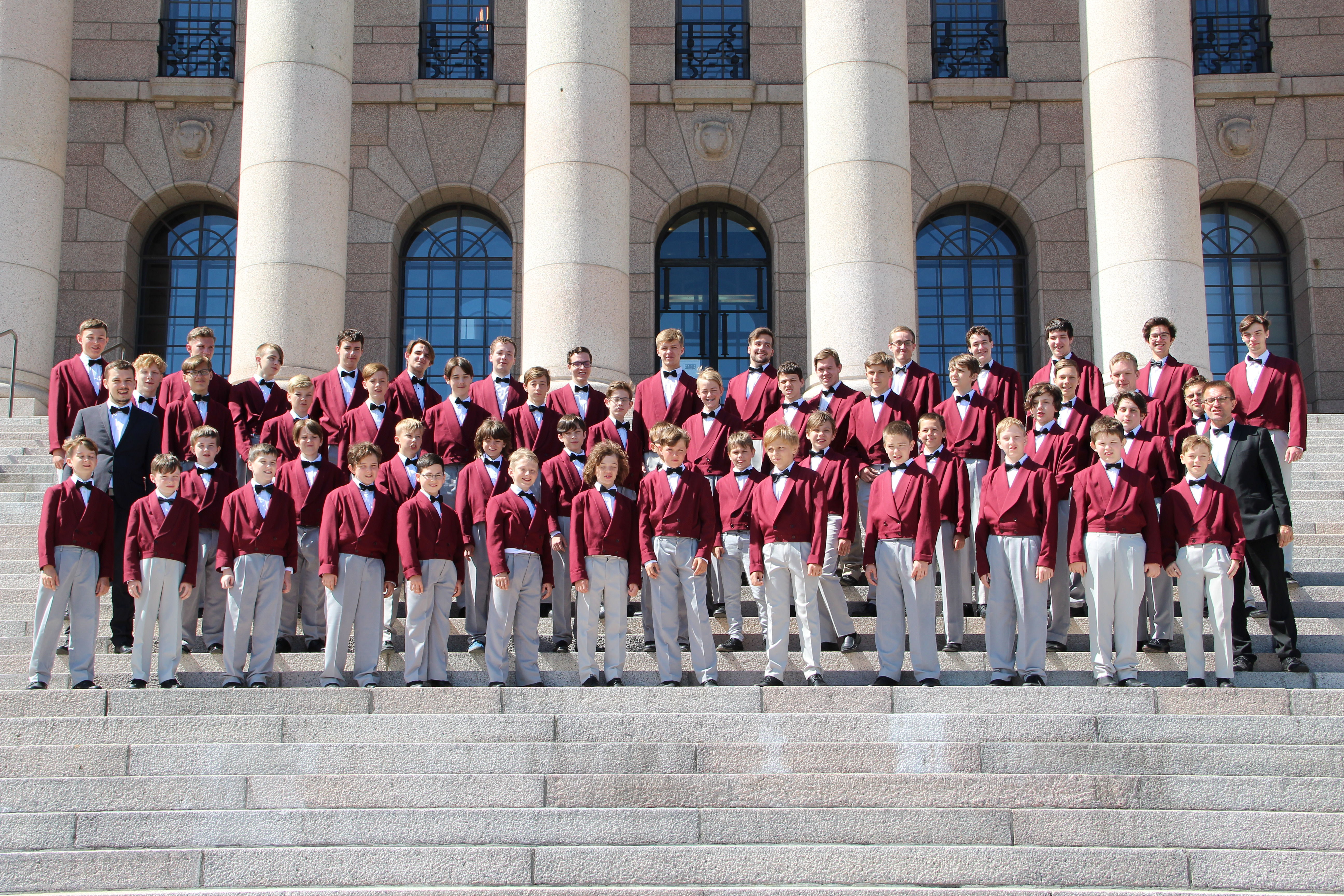 Koncertní sbor Pueri gaudentes před budovou parlamentu v Helsinkách